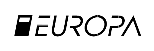 Logo de Europa de PostEurop.